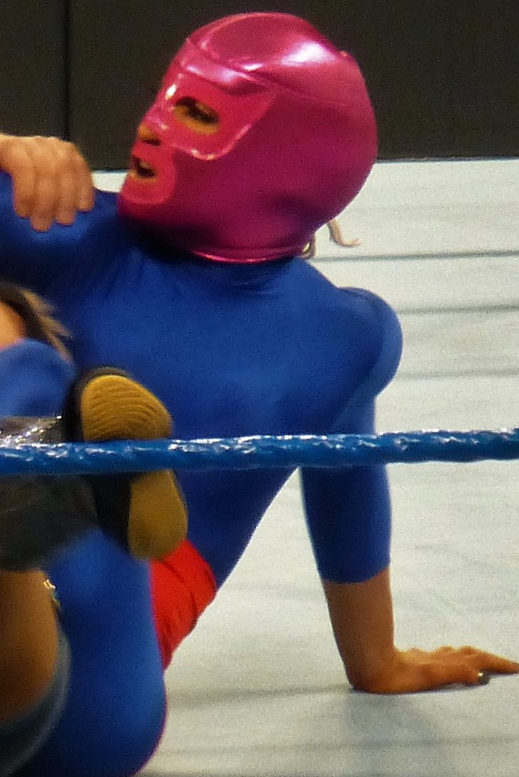 La Luchadora and Alexa Bliss